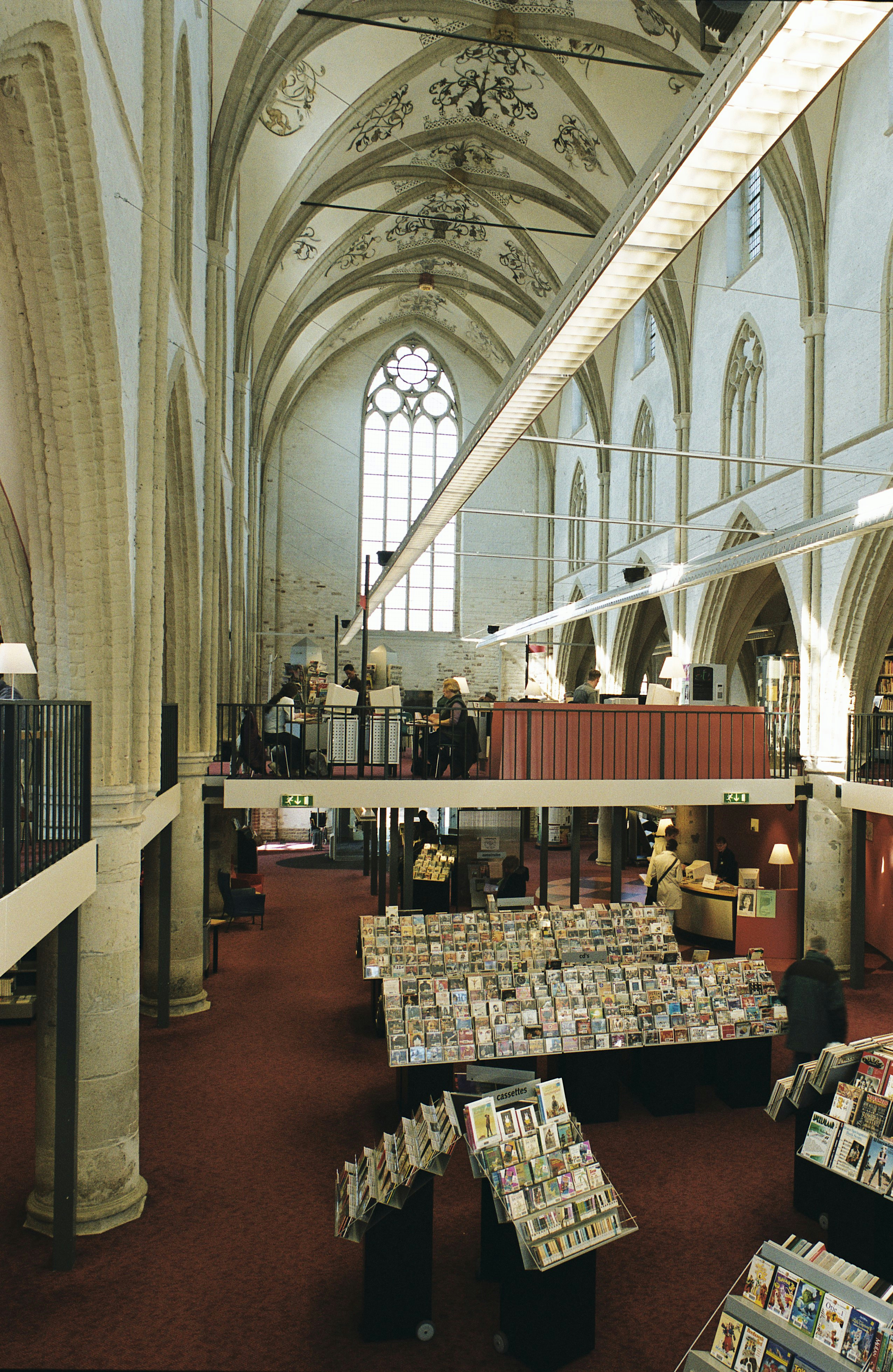 Broederenkerk: Interieur, overzicht van de passage (opmerking: Gefotografeerd voor Kanjers eerste ronde)